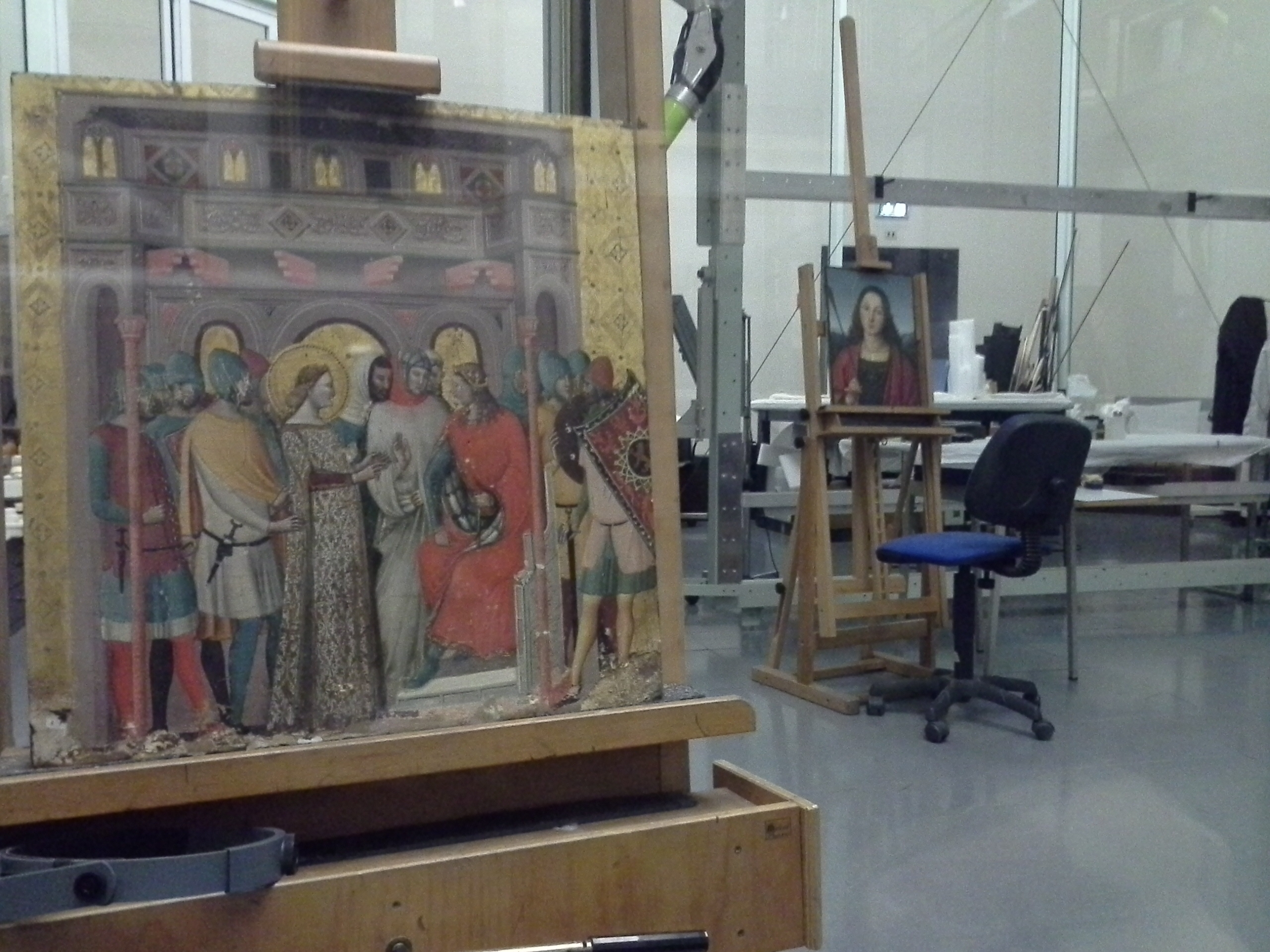 Laboratorio di restauro “a vista” nella Sala 18 della Pinacoteca di Brera, Milano. In primo piano Santa Colomba dinanzi all'imperatore Aureliano di Giovanni Baronzio, sullo sfondo San Sebastiano di Raffaello Sanzio.